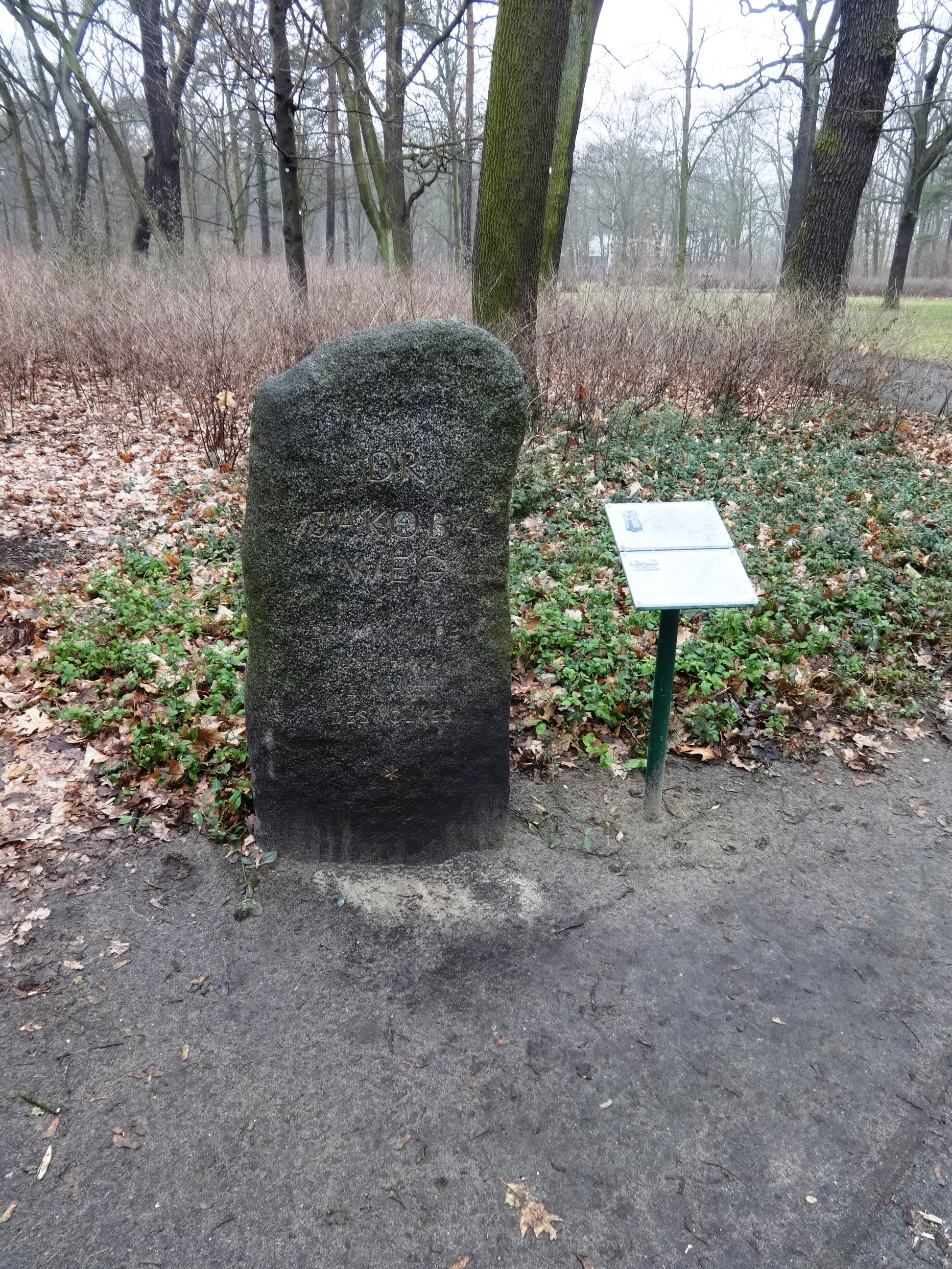 Der Kurpark Friedrichshagen ist eine rund 12 Hektar große Grünanlage in Berlin-Friedrichshagen. Sie entstand um 1880 im Zuge der Bemühungen der Gemeinde, Friedrichshagen zum Kurort zu erheben.